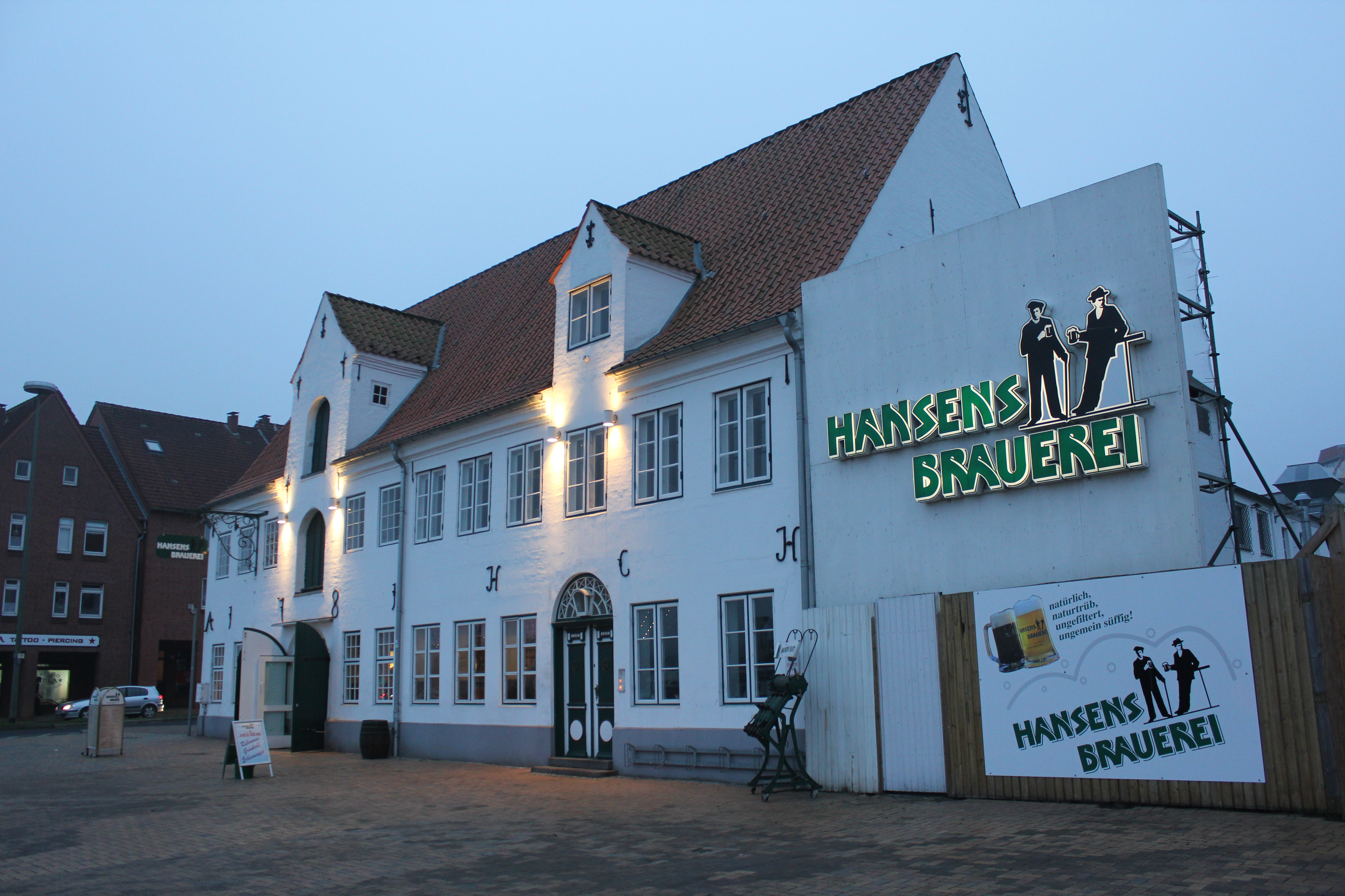 Hansens Brauerei (Flensburg) zum Abend (im Jahre 2011)